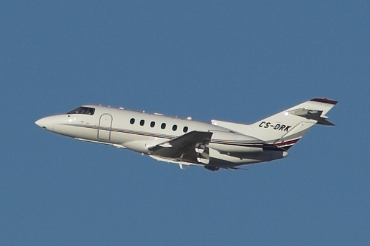 NetJets Hawker 850XP CS-DRK